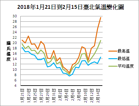 依據中央氣象局觀測資料使用Excel軟體繪製臺北氣溫變化圖。 觀測資料來源：